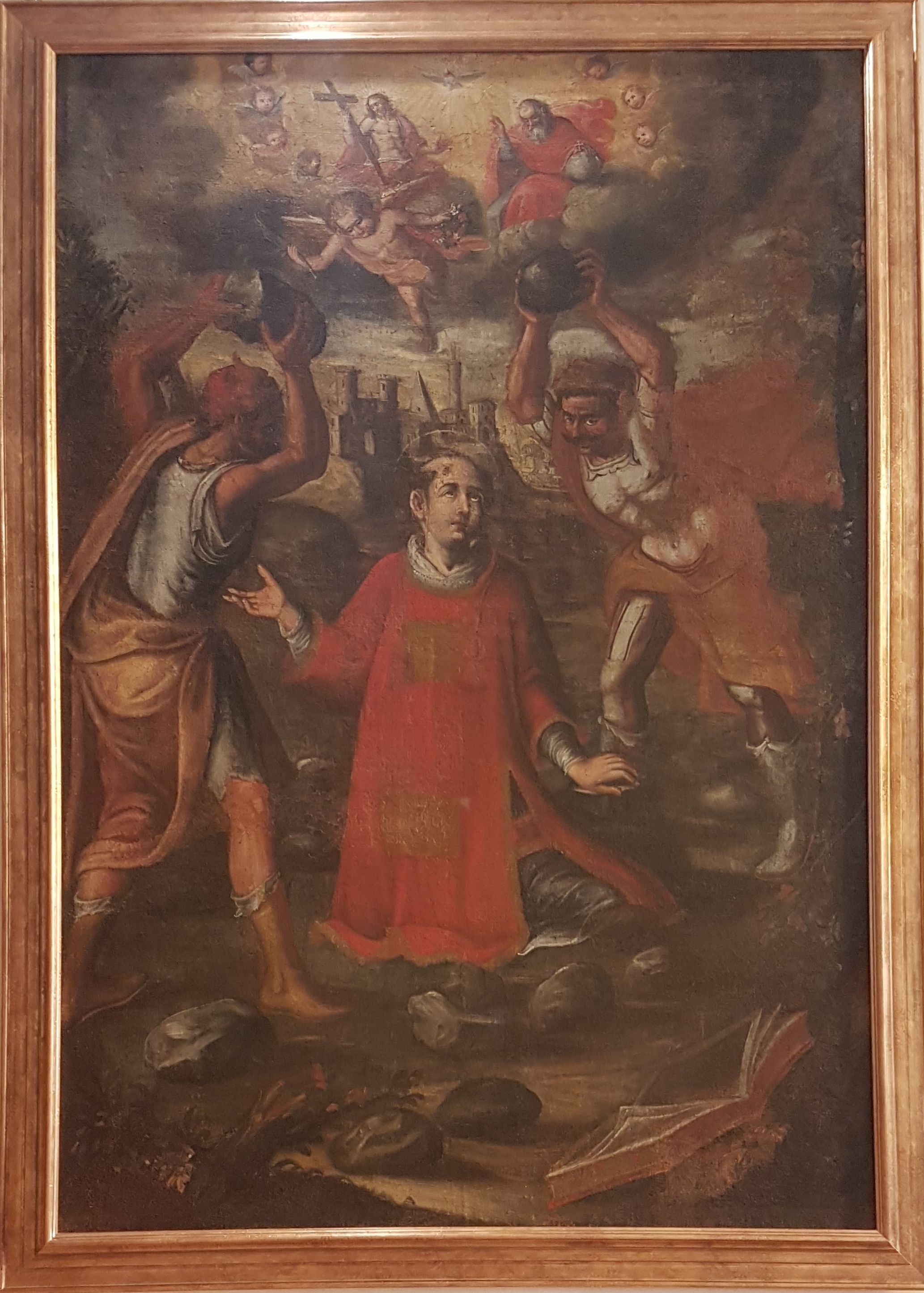 Quadro che rappresenta il Martirio di Santo Stefano